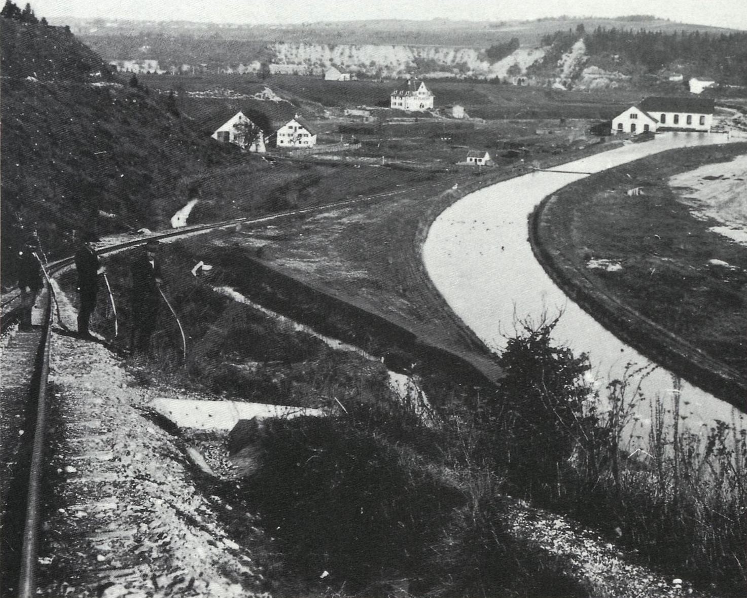 Steilstrecke mit Zahnstangenabschnitt der Kinsauer Zahnradbahn, rechts der Lech, im Hintergrund die Holzstofffabrik